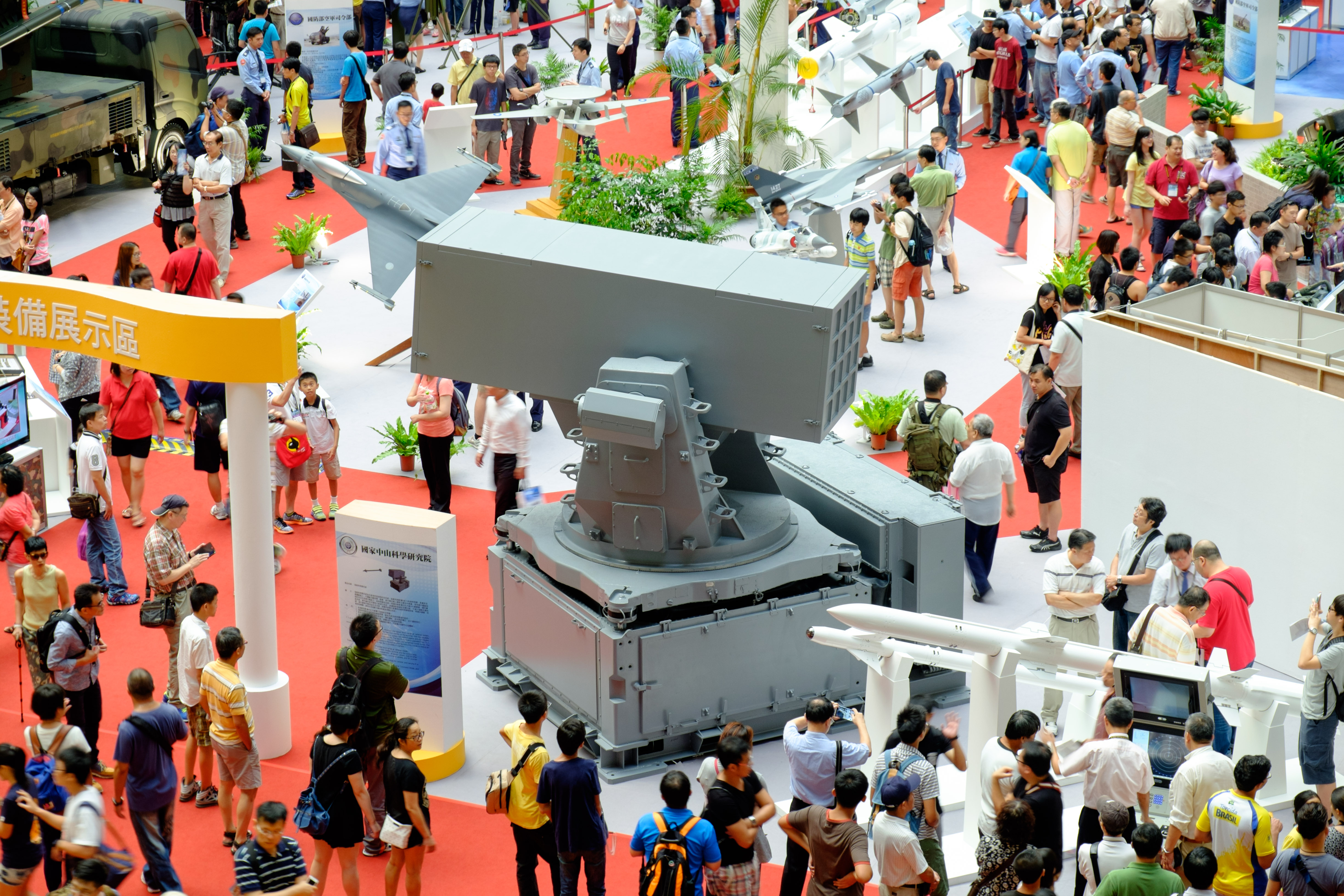 2015台北國際航太暨國防工業展覽會第三日，國防館展示的海劍羚系統與飛彈模型俯覽。